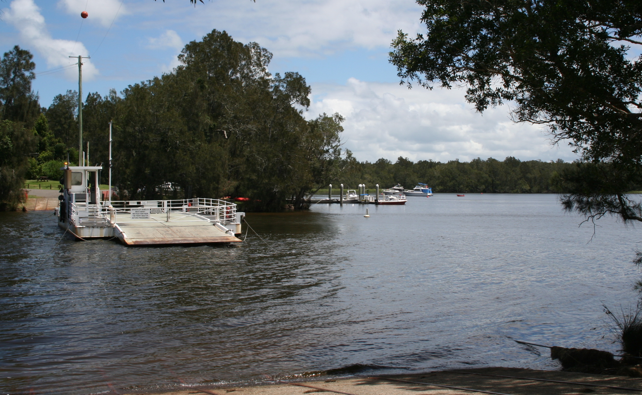 Bombah Point Ferry